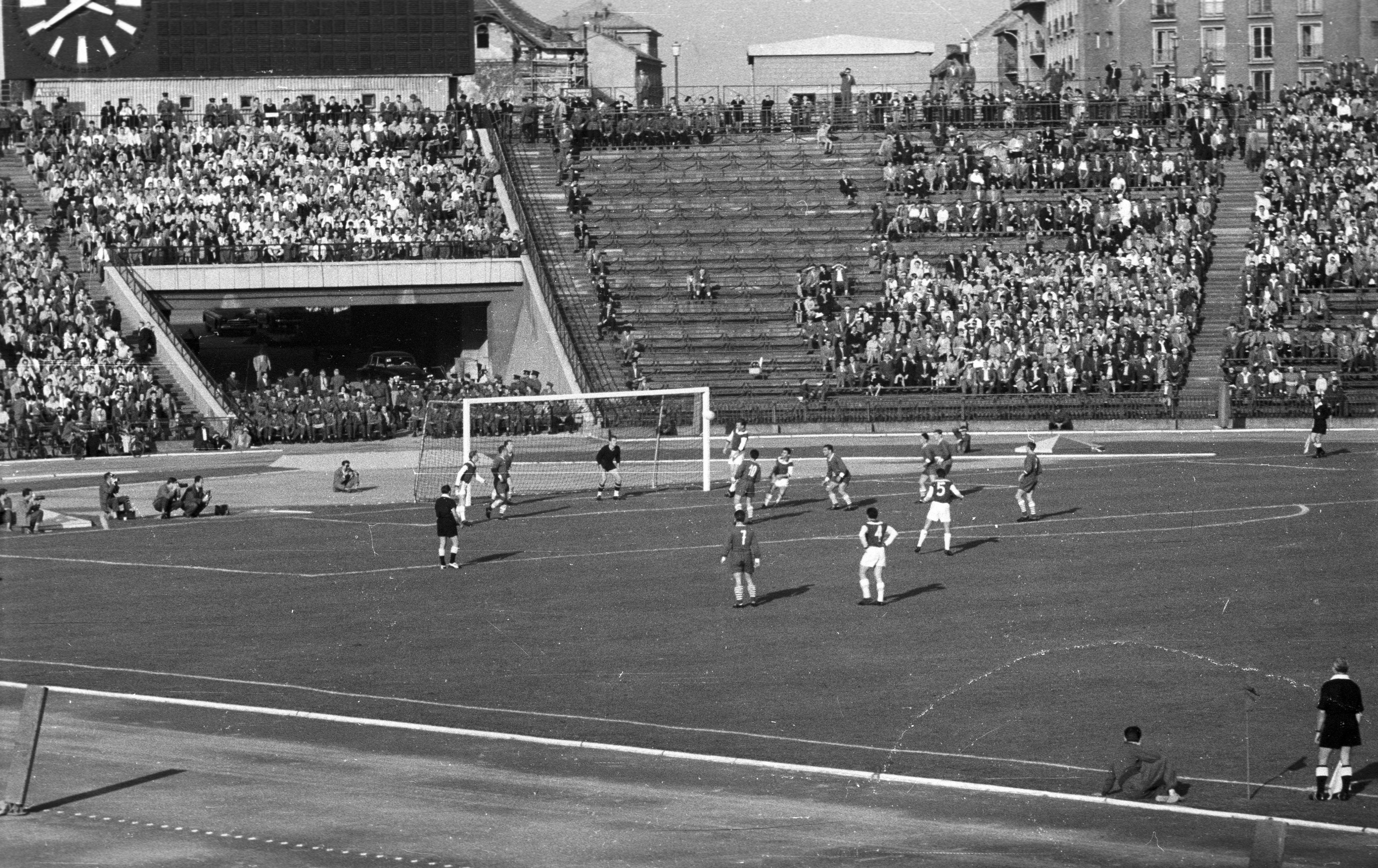 Ferencváros - Újpesti Dózsa meccs. Location: Hungary, Budapest XIV., Népstadion Tags: stadium, football, Budapest Title: Ferencváros - Újpesti Dózsa meccs.